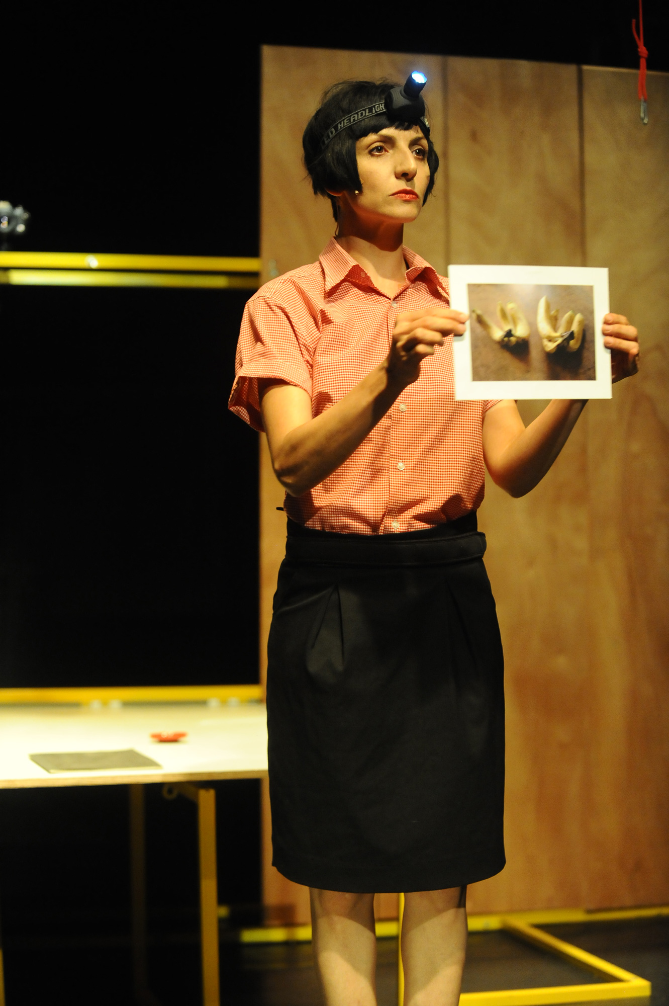 מיכל ויינברג כסבינה זאובר בהצגה "מיין ג'רוזלם" בתיאטרון תמונע